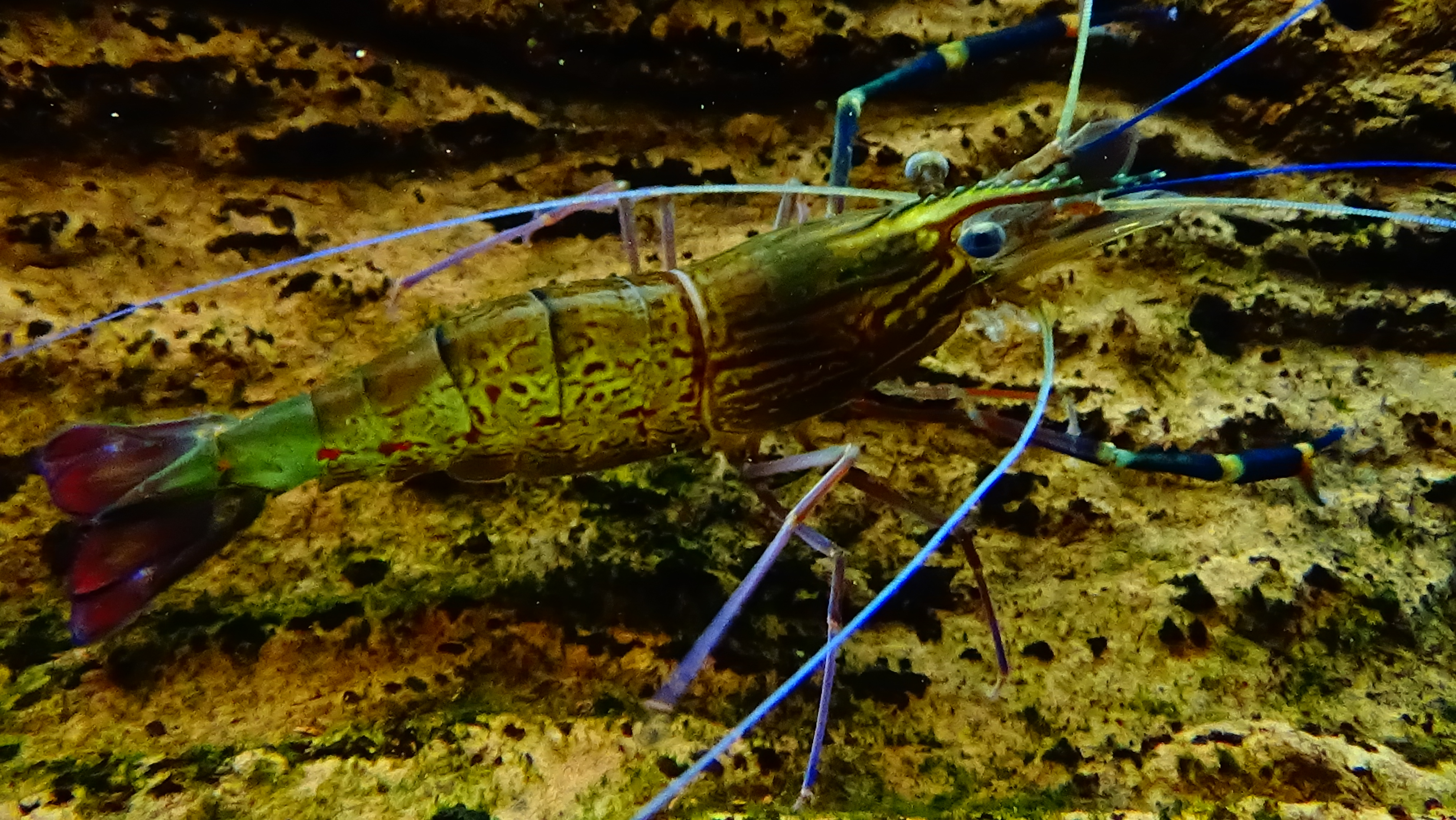 Macrobrachium rosenbergii - crevette géante d'eau douce - Aquarium tropical de la Porte Dorée - 12/2014